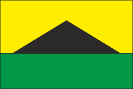 Прапор Вознесенівки